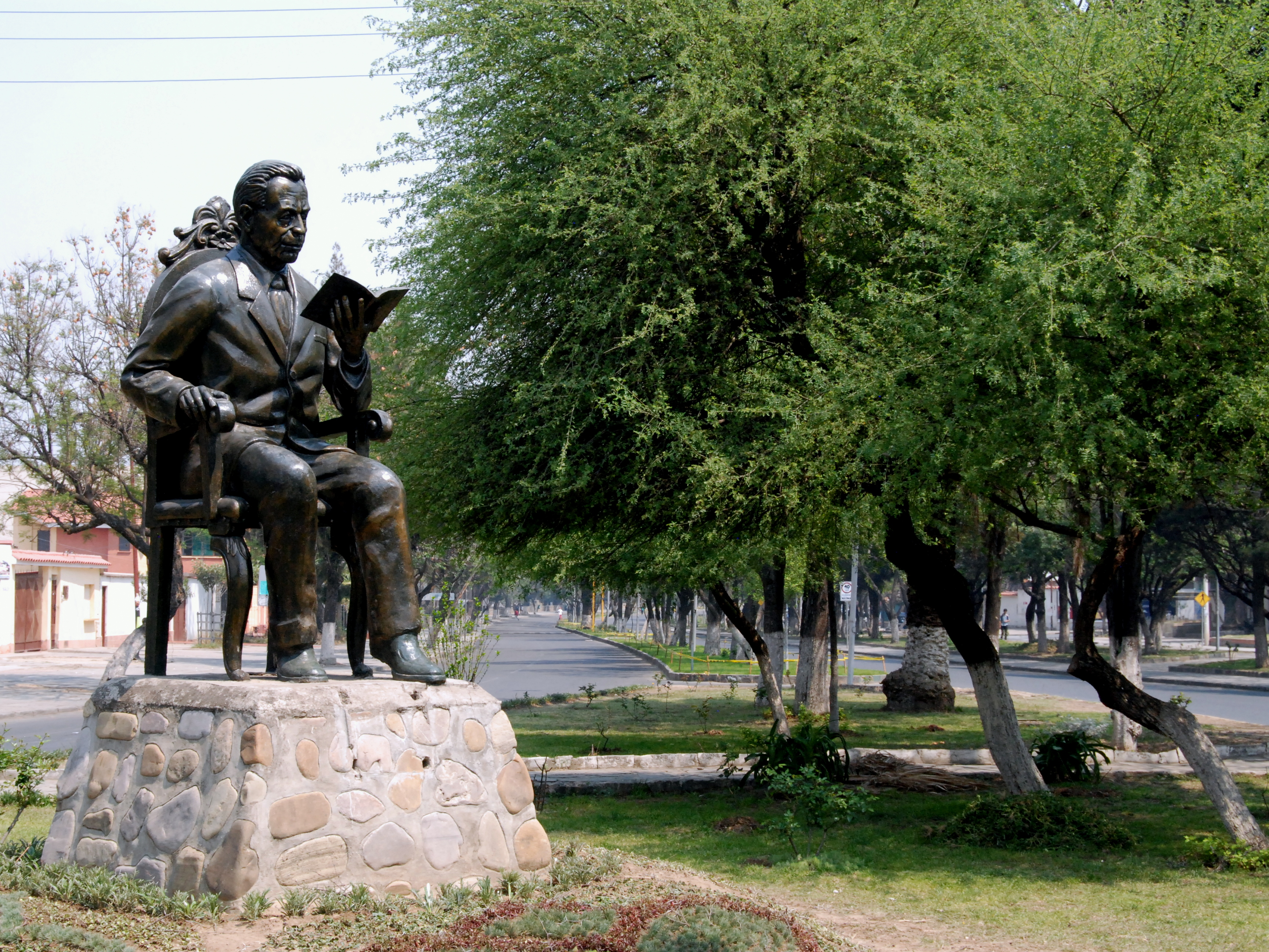 Víctor Paz Estenssoro This medium shows the protected monument with the number T/00-002 in Bolivia.